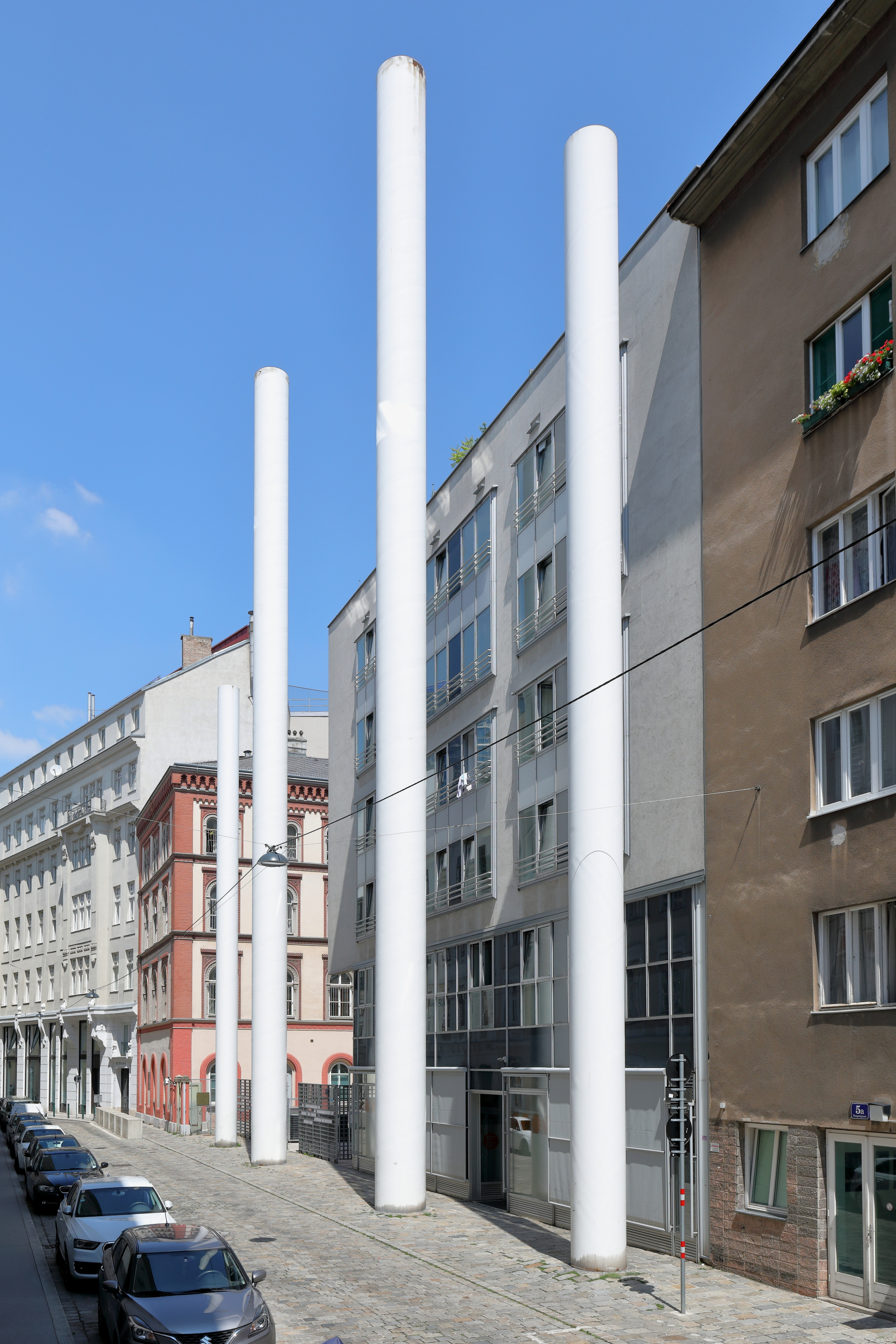 Das „Memorial für den Leopoldstädter Tempel“ in der Tempelgasse im 2. Wiener Gemeindebezirk Leopoldstadt.Das Mahnmal wurde nach einem Entwurf des Architekten Martin Kohlbauer errichtet und am 31. März 1998 „enthüllt“. Es besteht aus vier weißen Säulen in der Höhe von 24 beziehungsweise 28 Metern, die im Originalmaßstab an die Größe der zerstörten Synagoge erinnern sollen.